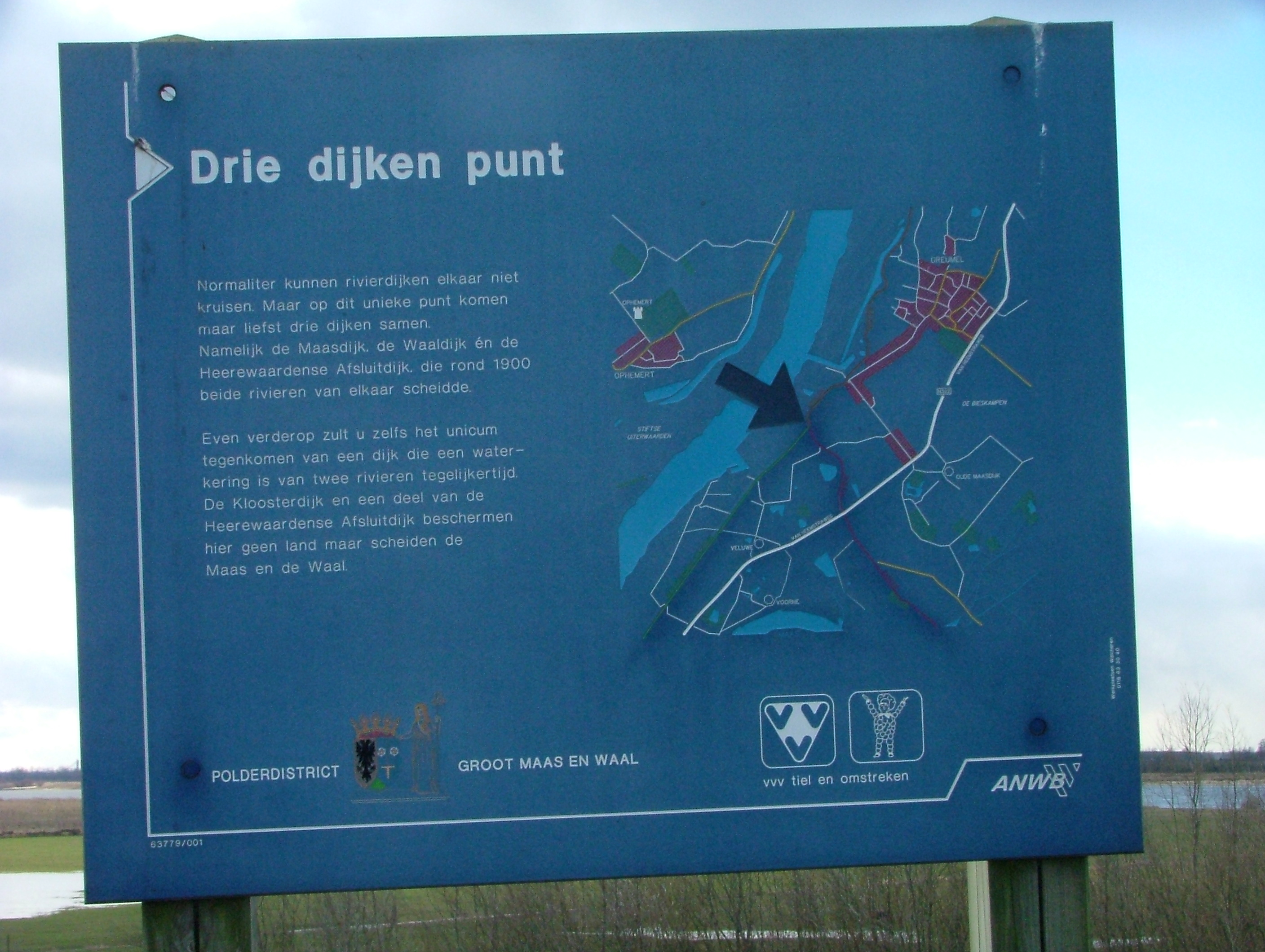 Drie Dijkenpunt Heerewaarden, Eigen Materiaal Geert Smulders, Rosmalen Licensing Categorie:Wikipedia:Afbeeldingen/Gebruiker:Hsf-toshiba Categorie:Maasdriel